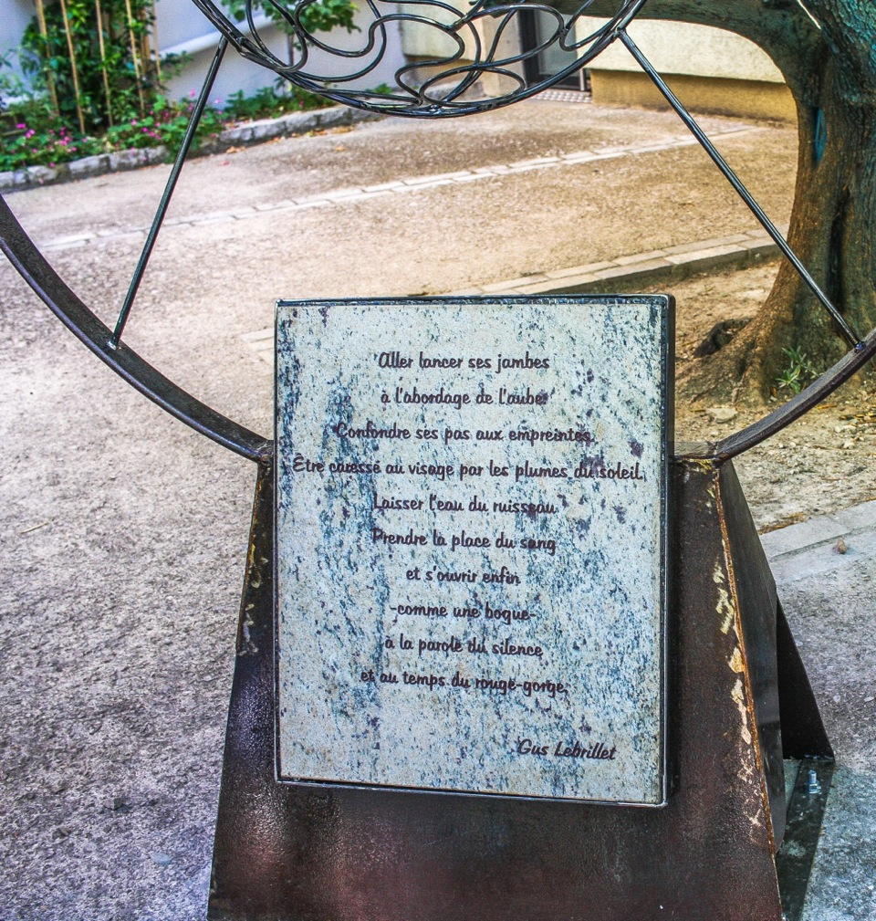 Prix de poésie